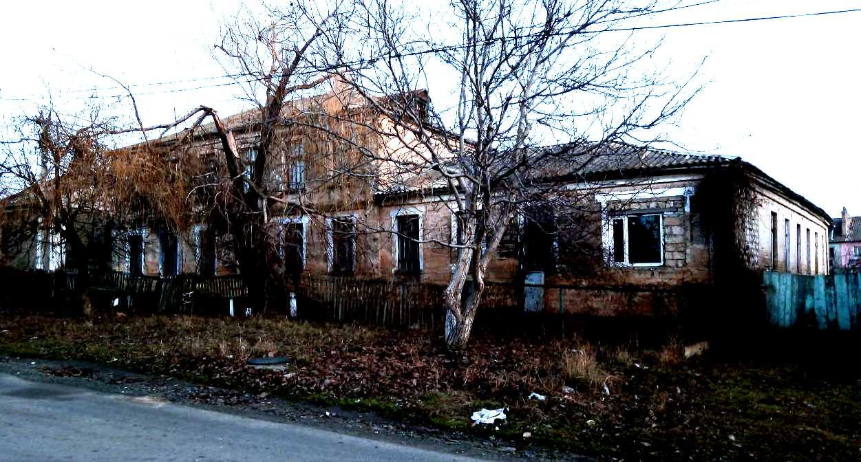 Будинок на вулиці Торгова, Затишшя